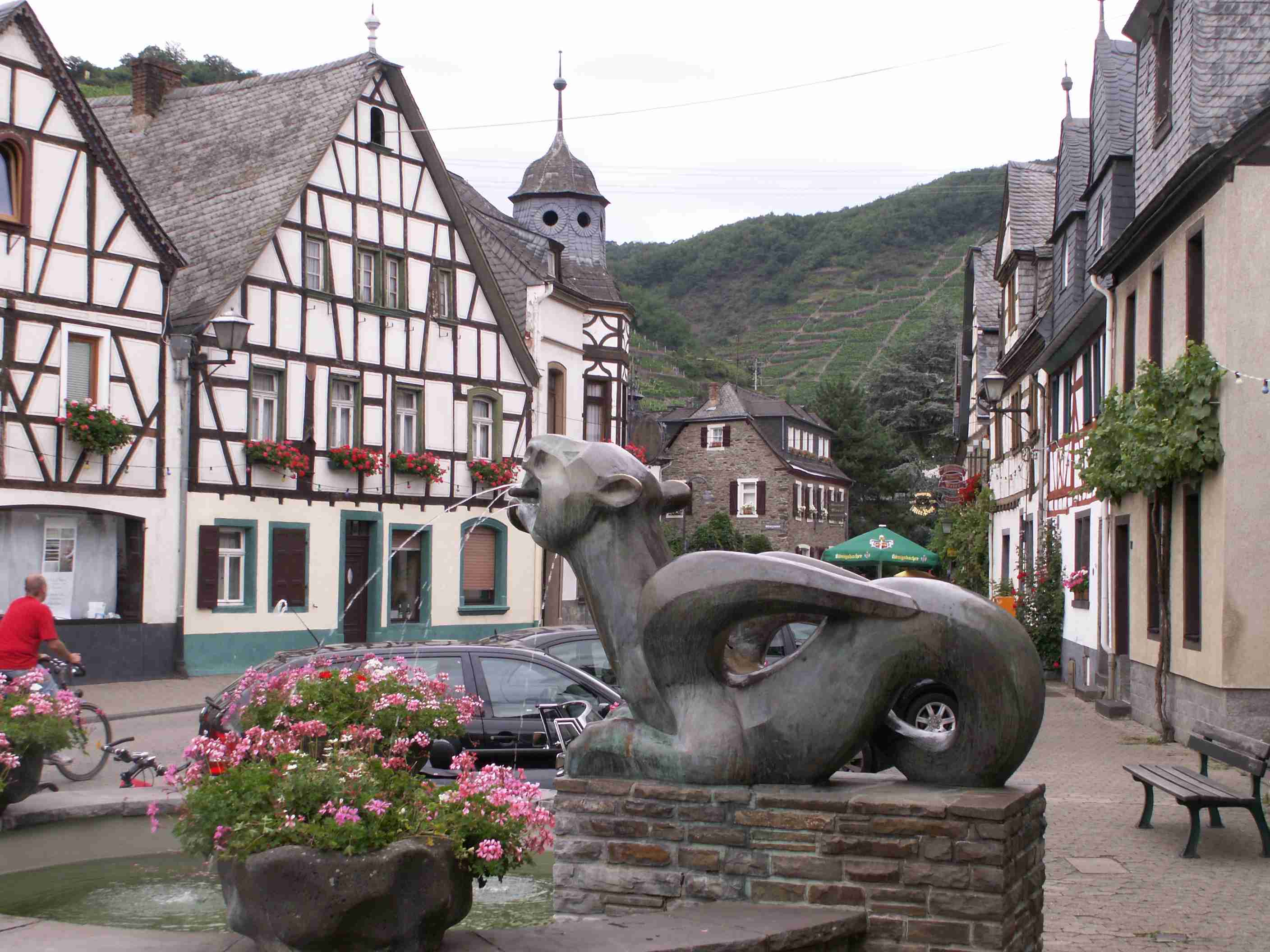 Brunnenskulptur